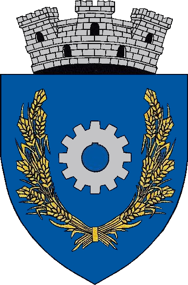 Stema orașului Scornicești